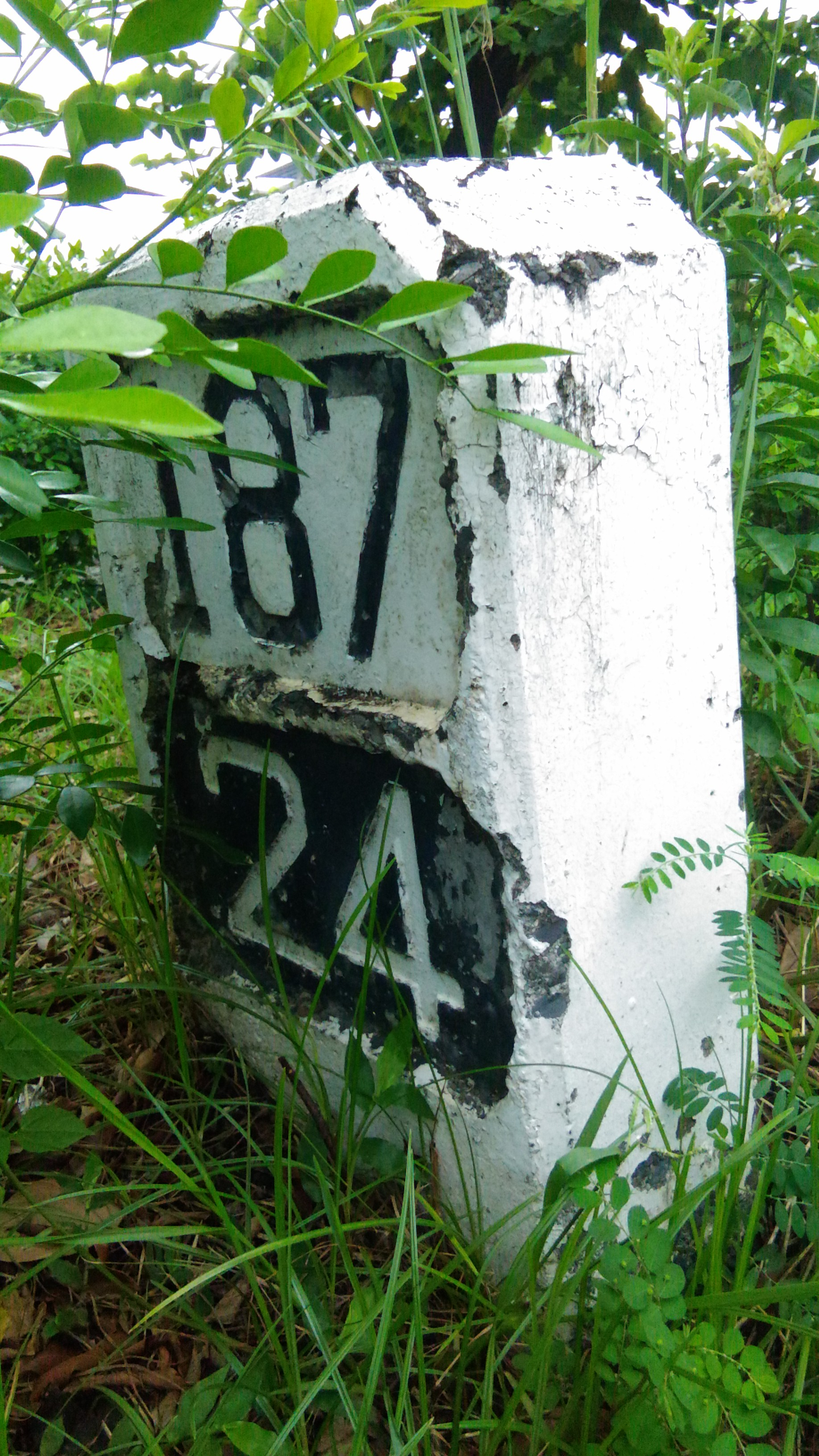 位於縣道187號上，水泥製的24k里程碑